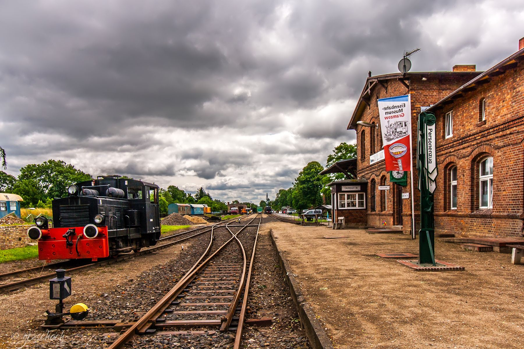 Eisenbahnmuseum Gramzow Bahnhof an der ehemaligen Kreisbahn Schönermark – Damme